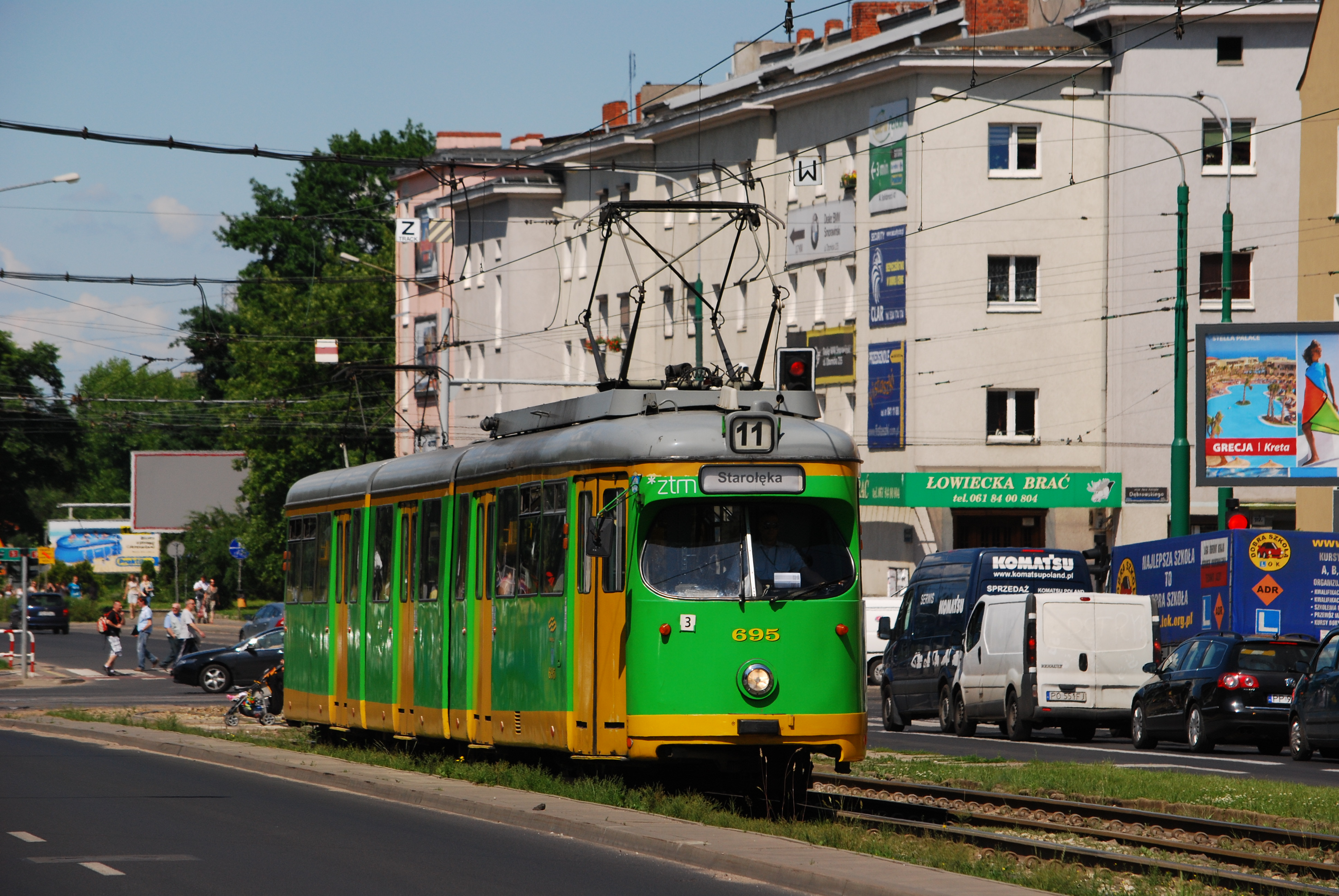 Wagon Düwag GT8 o numerze bocznym #695 w malowaniu MPK Poznań